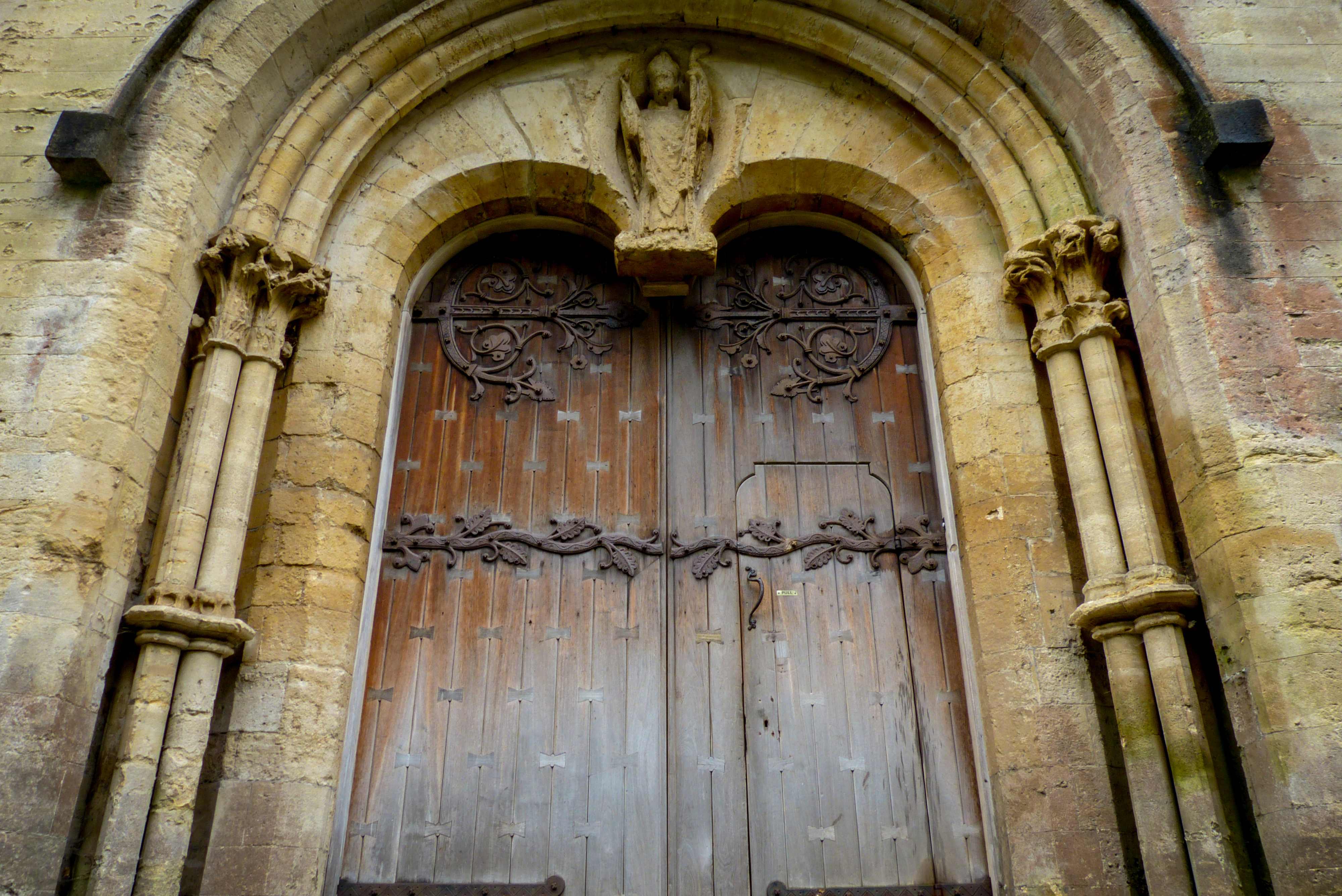 Llandaff Cathedral